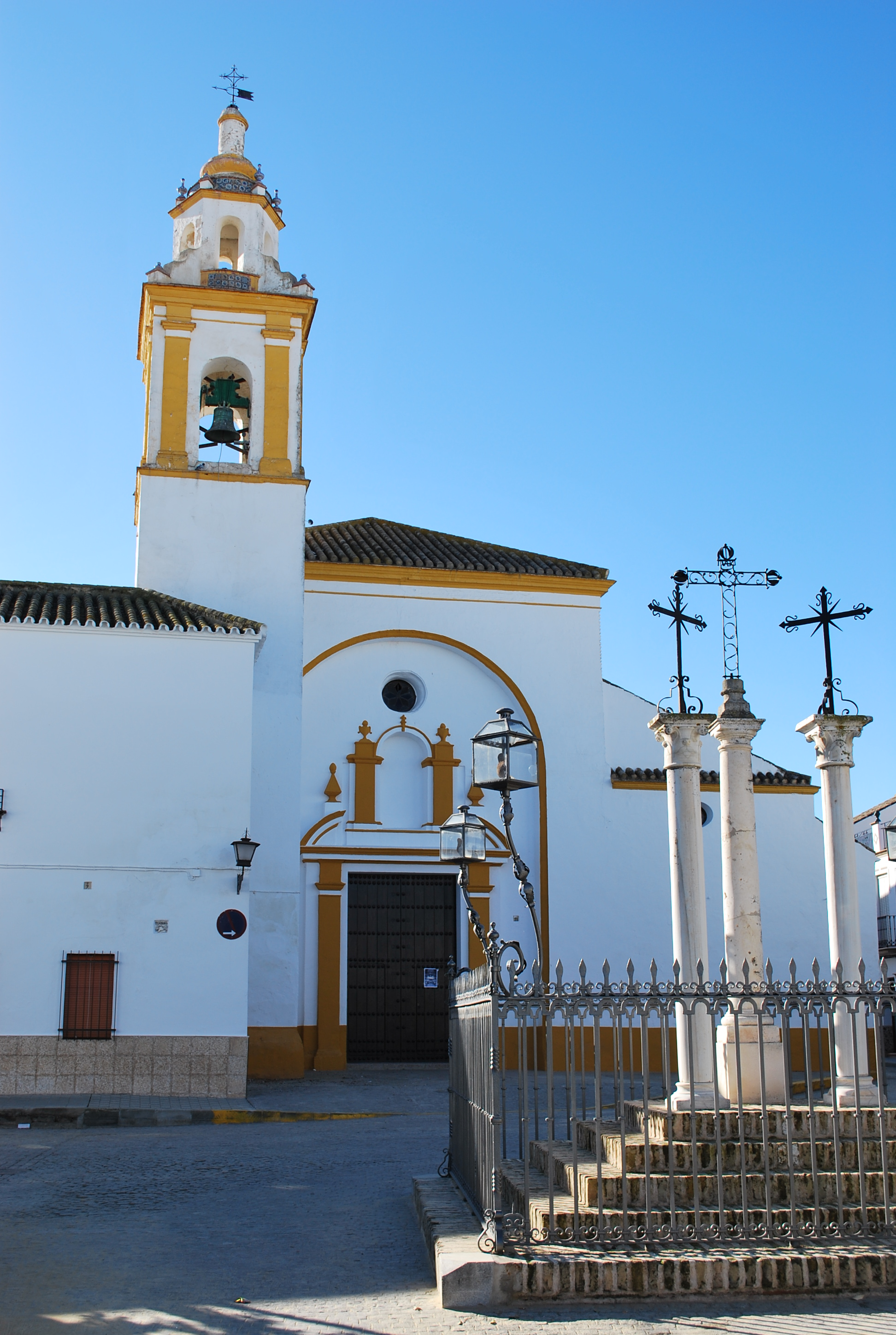 Iglesia de Ntra Sra de las Virtudes